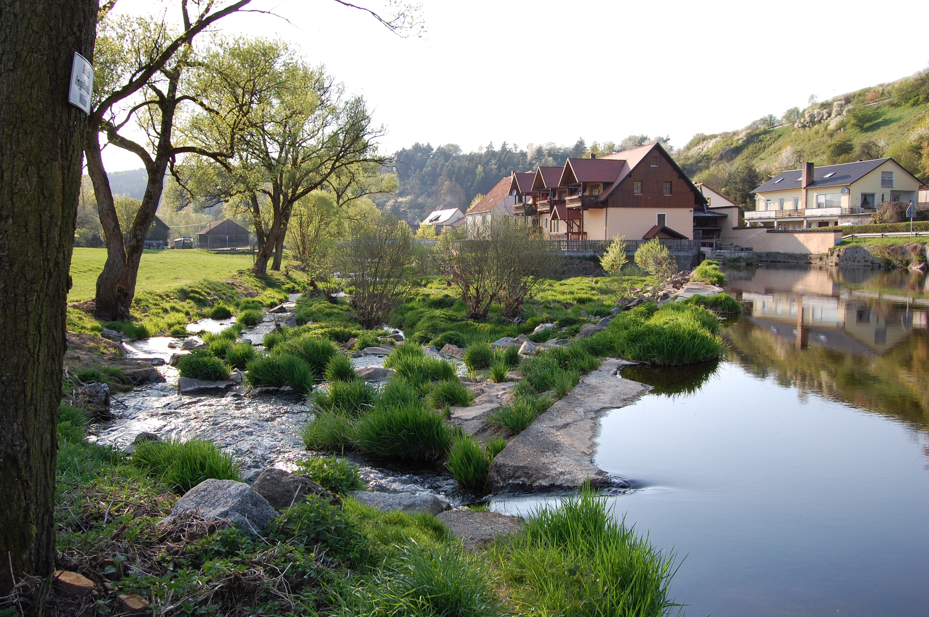 Fluss Pfreimd bei Stein an der Pfreimd, Landkreis Schwandorf, Oberpfalz, Bayern (2011)